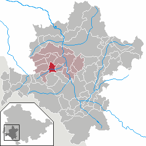 Wahns in Thuringia - District Schmalkalden-Meiningen